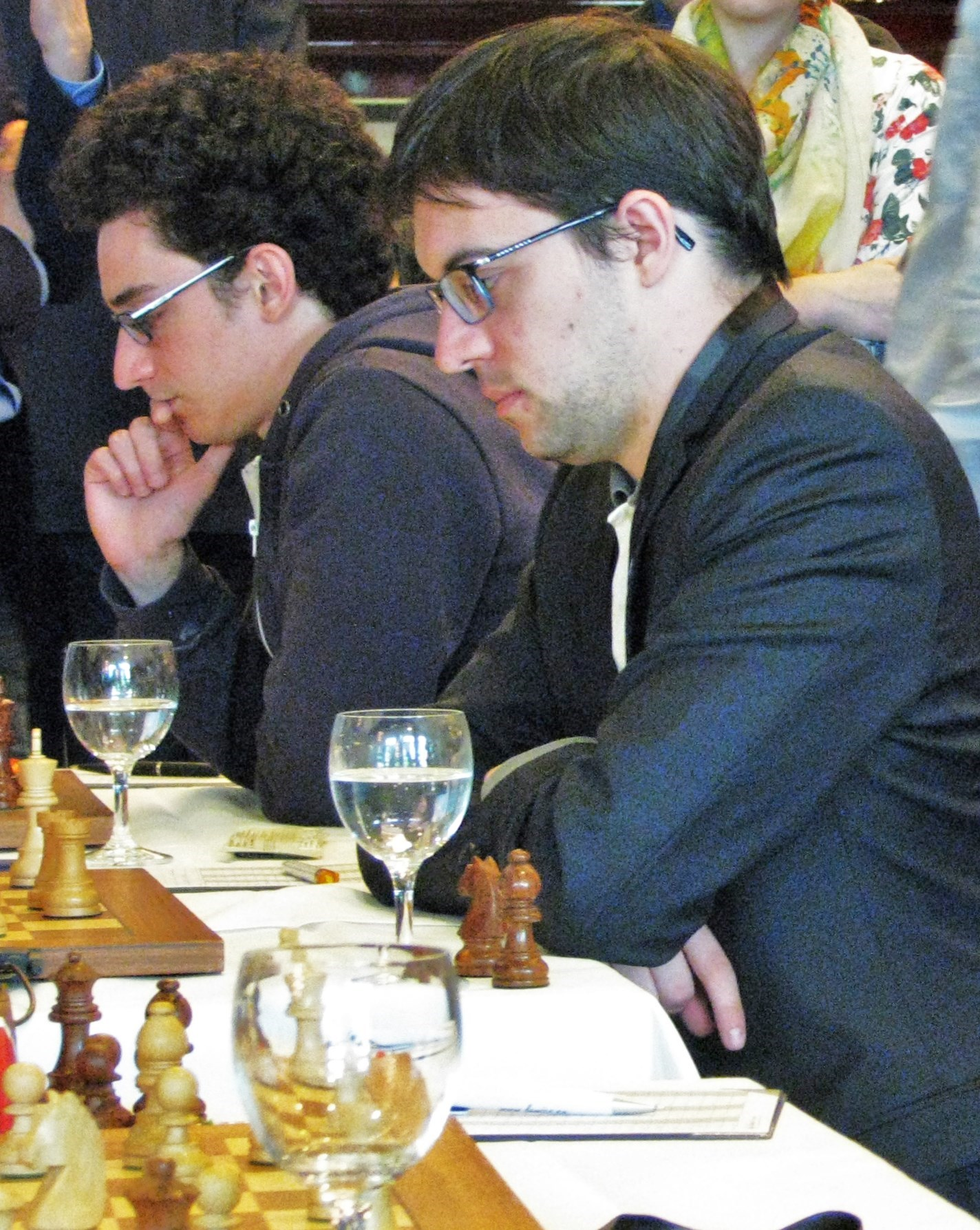 Fabiano Caruana (li.) und Maxime Vachier Lagrave am 30. April 2017 in Berlin